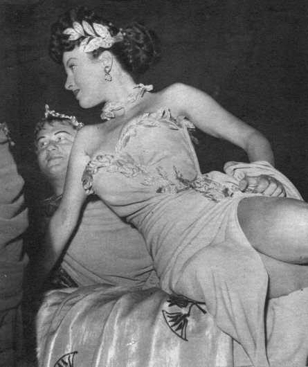 Gino Cervi e Silvana Pampanini in una foto di scena di O.K. Nerone, regia di Mario Soldati (1951).